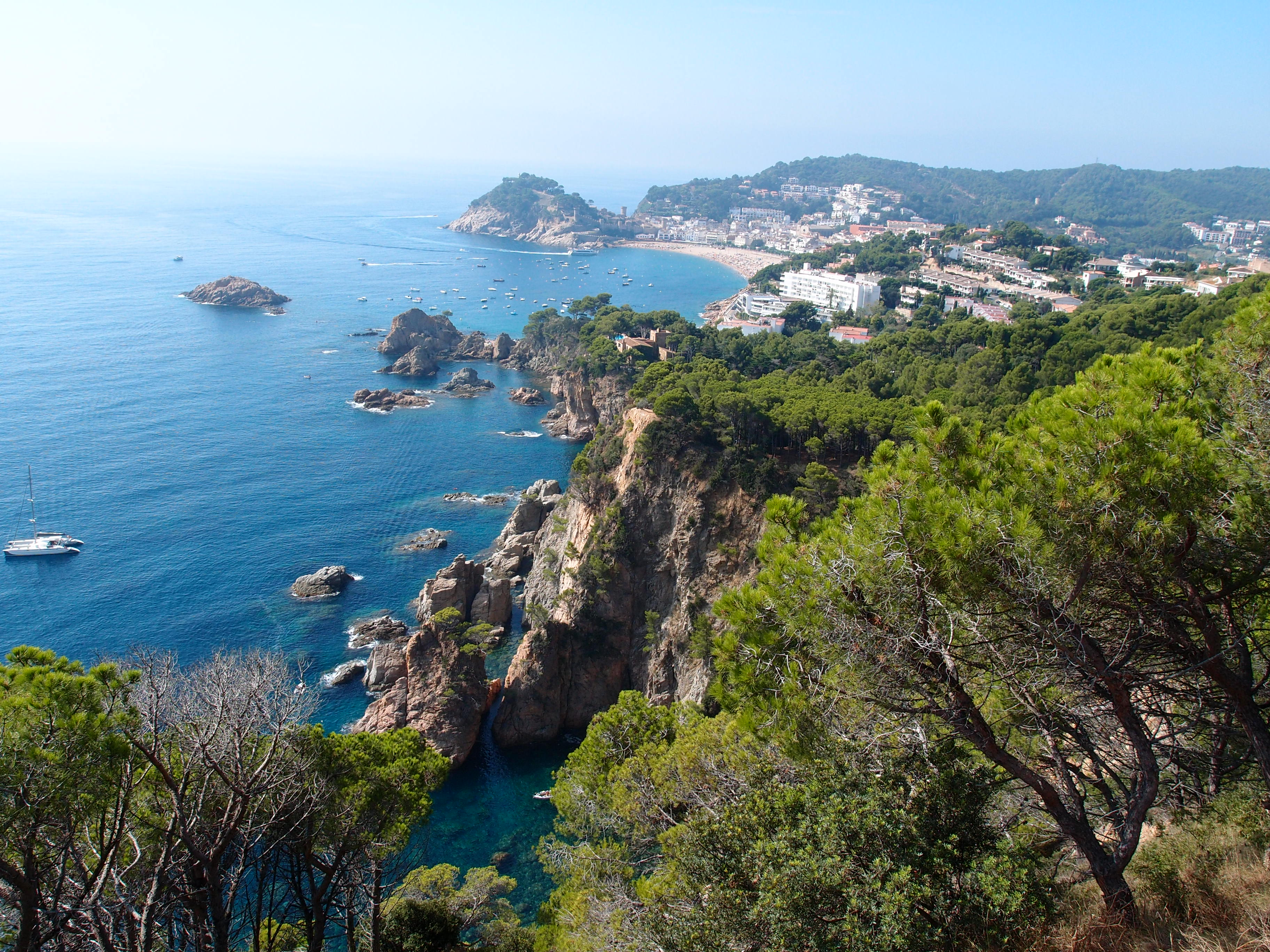 Felsküste bei Tossa de Mar (Katalonien/Spanien) Datum: 17.09.2011 Urheber: M. Pfeiffer alias Benutzer:Gordito1869 Quelle: Privates Fotoarchiv des Urhebers